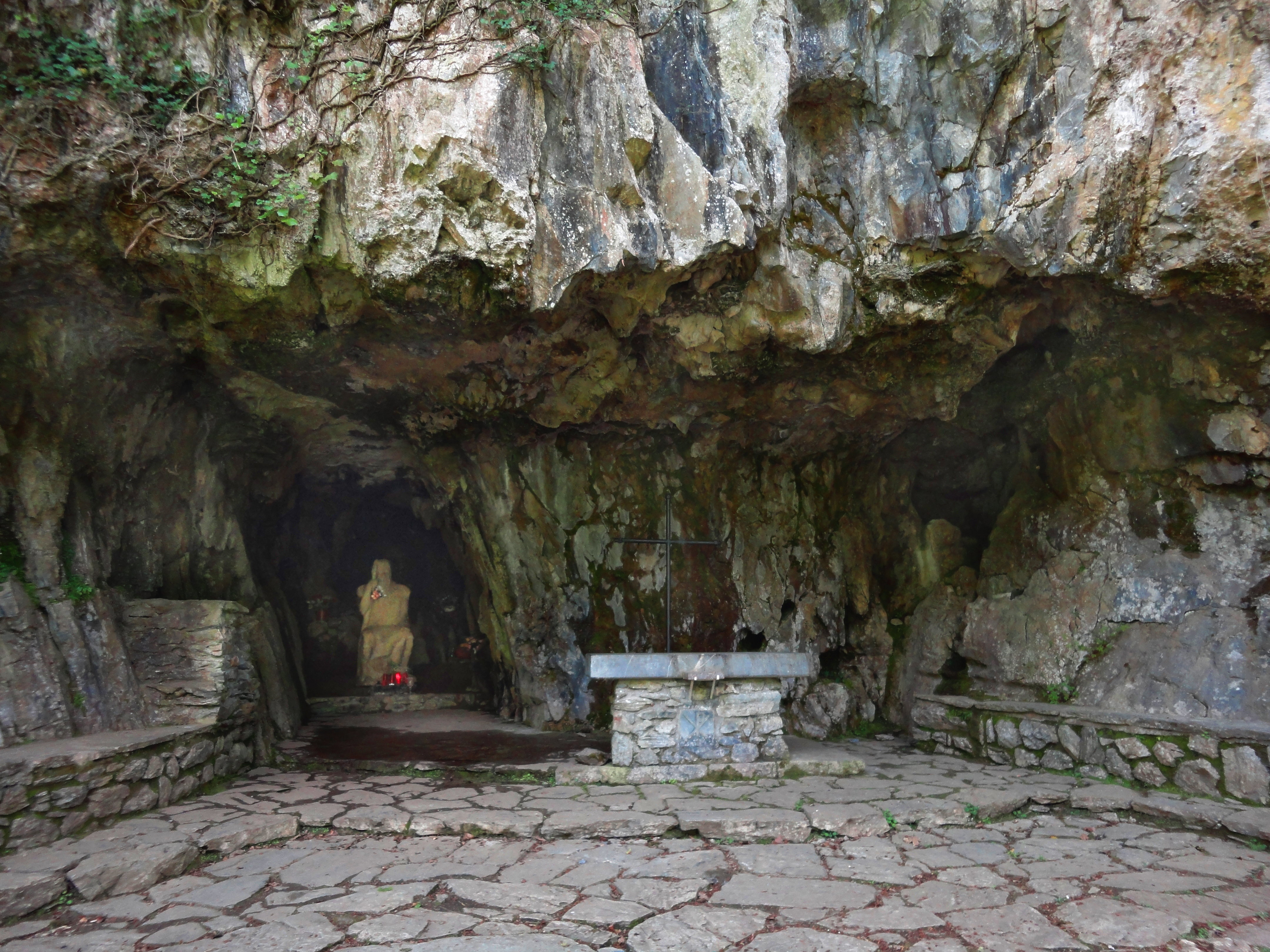 San Juan Xar - Arantza